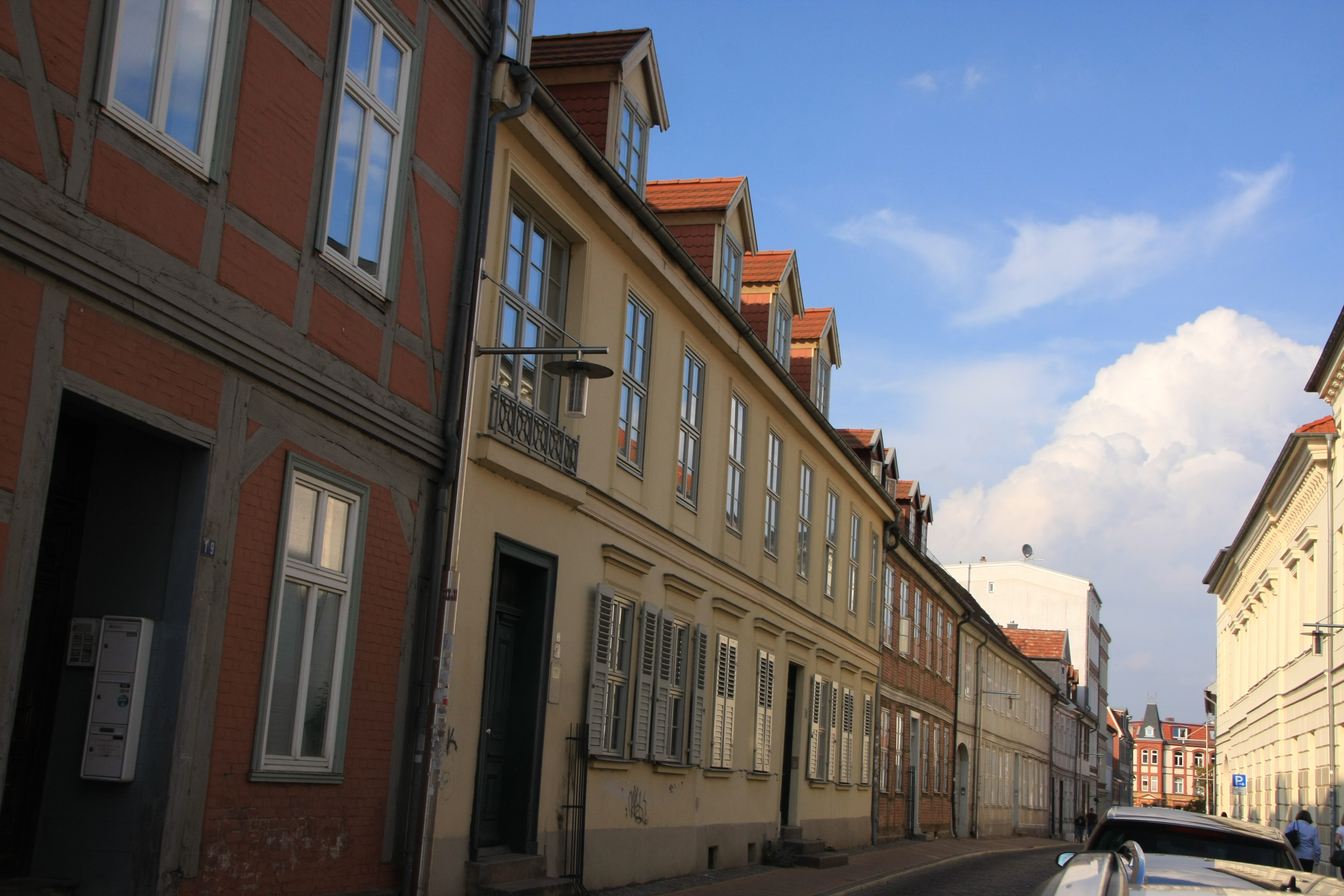 19055 Schwerin, Münzstraße 17